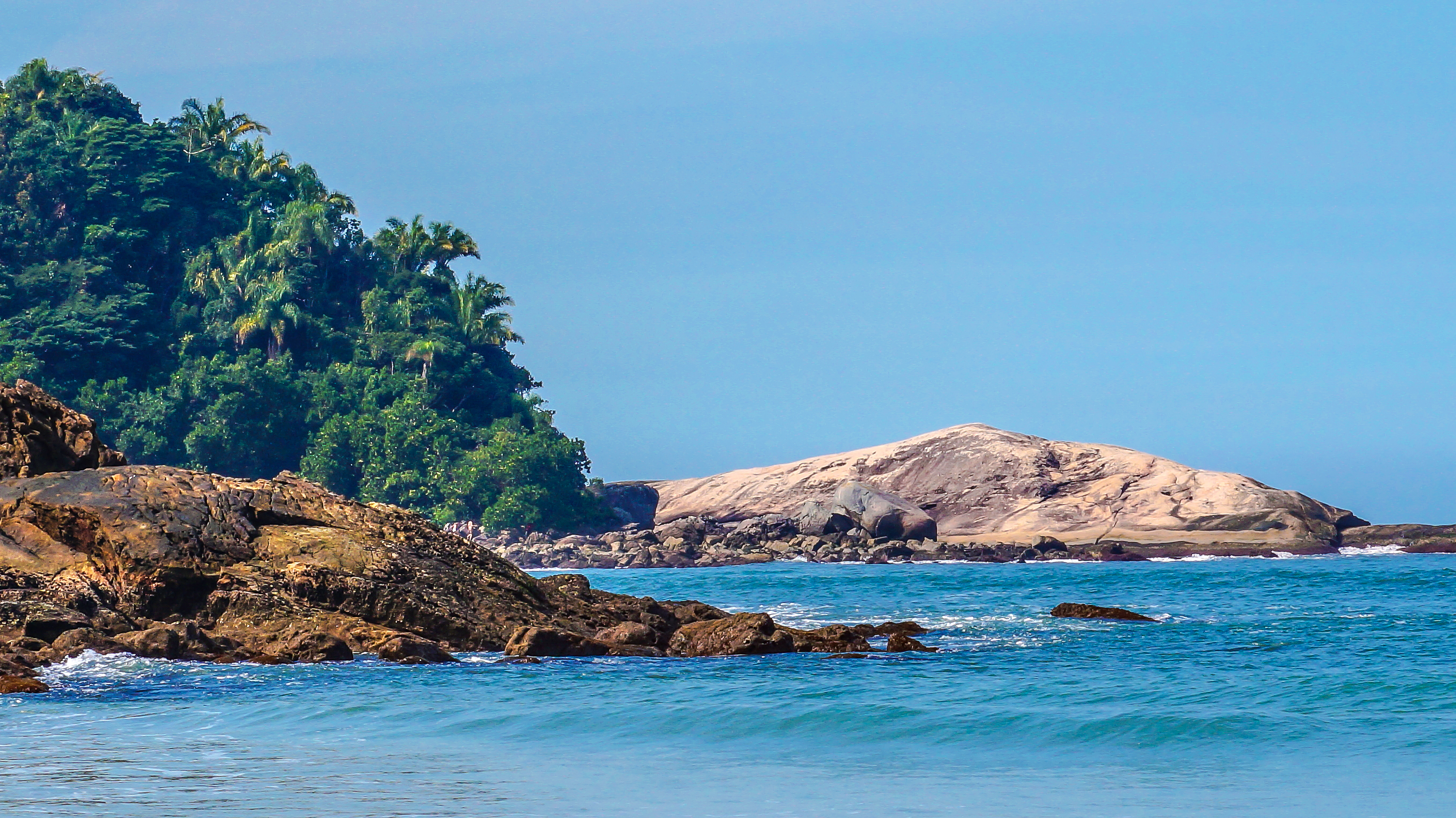 A Praia de Pernambuco é uma praia e bairro do município brasileiro de Guarujá, no litoral do estado de São Paulo. O bairro também é conhecido como Jardim Pernambuco. A região da Praia Pernambuco é tida como uma das mais belas do Guarujá.